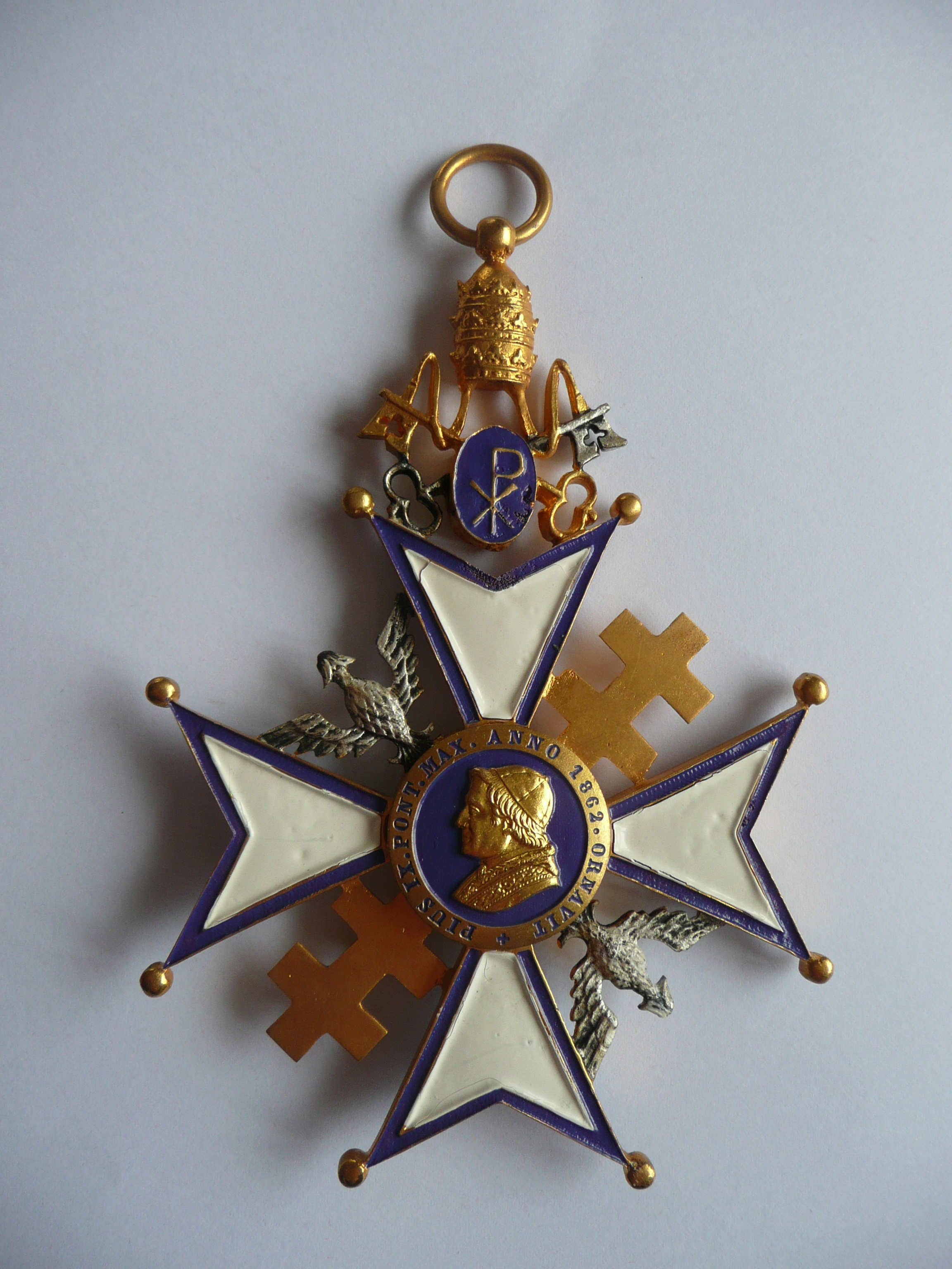 Vermeil et émail. Première moitié du XXème siècle